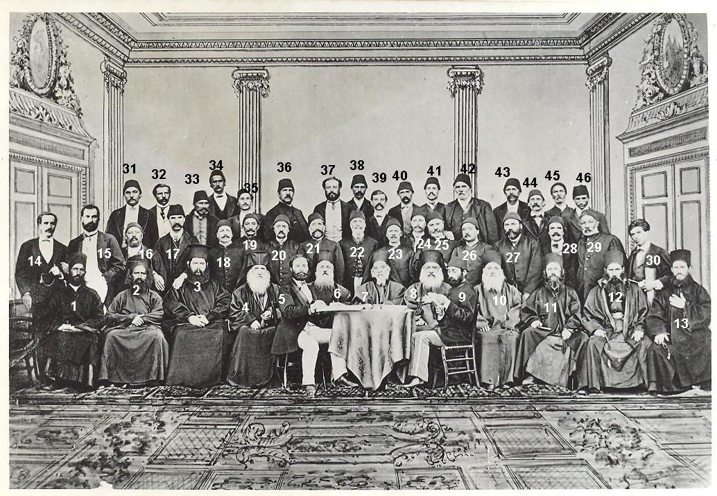 Българския народен събор в Цариград 1871